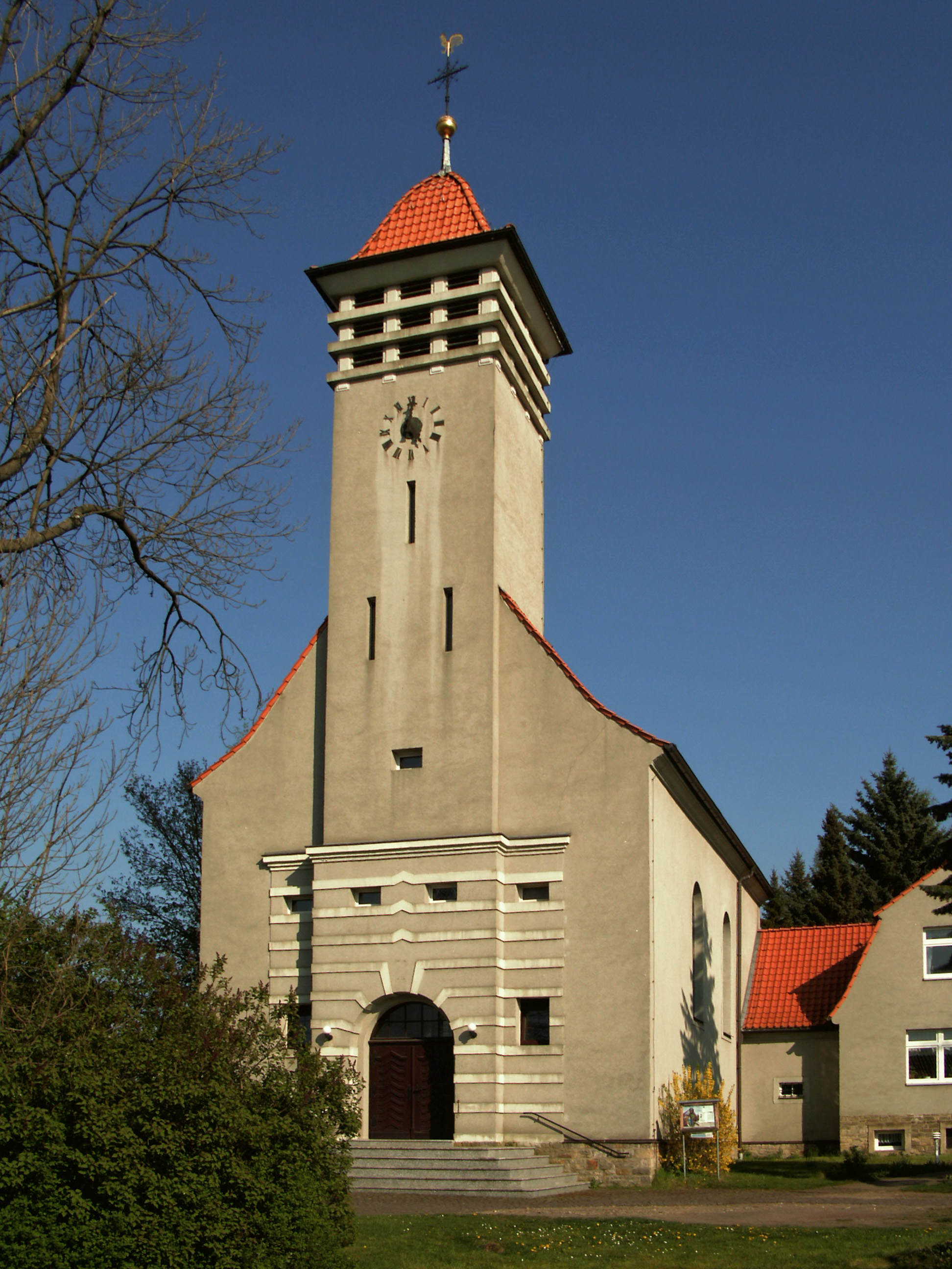 Katholische Kirche St. Joseph und Theresia vom Kinde Jesu in Weferlingen, Landkreis Börde